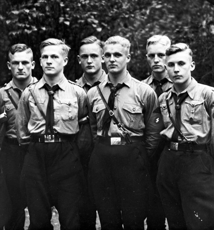 Gruppe von HJ-Jungen Verschiedene Porträtaufnahmen von Charakterköpfen, gesammelt im Rassepolitischen Amt der NSDAP [Gruppenbild blonder junger Männer in HJ Uniform] Information added by Wikimedia users.